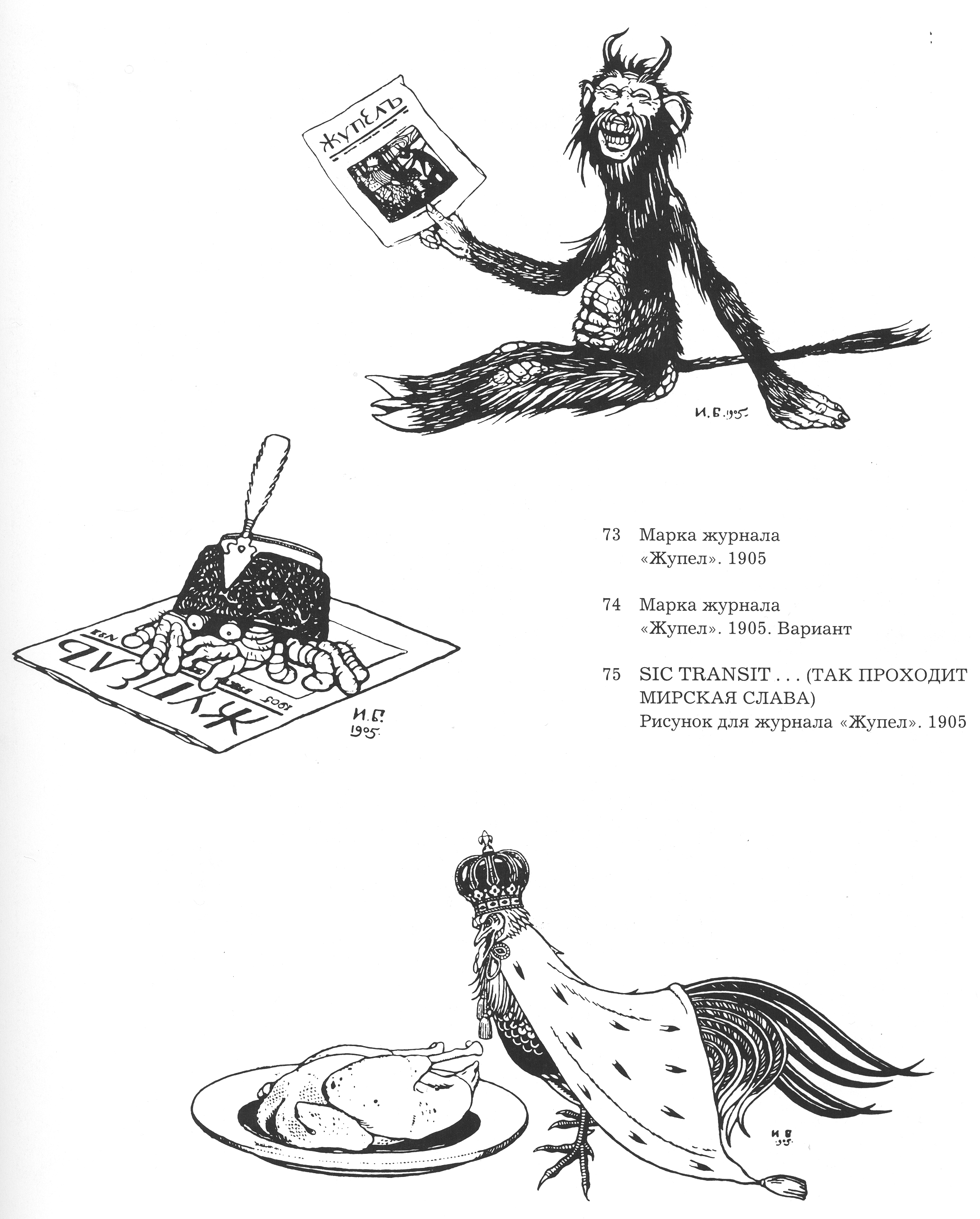 Произведение Ивана Билибина